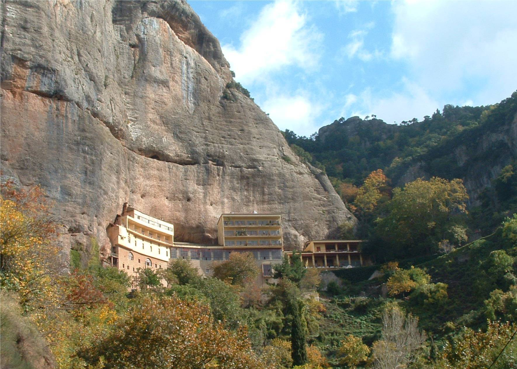 november 2005